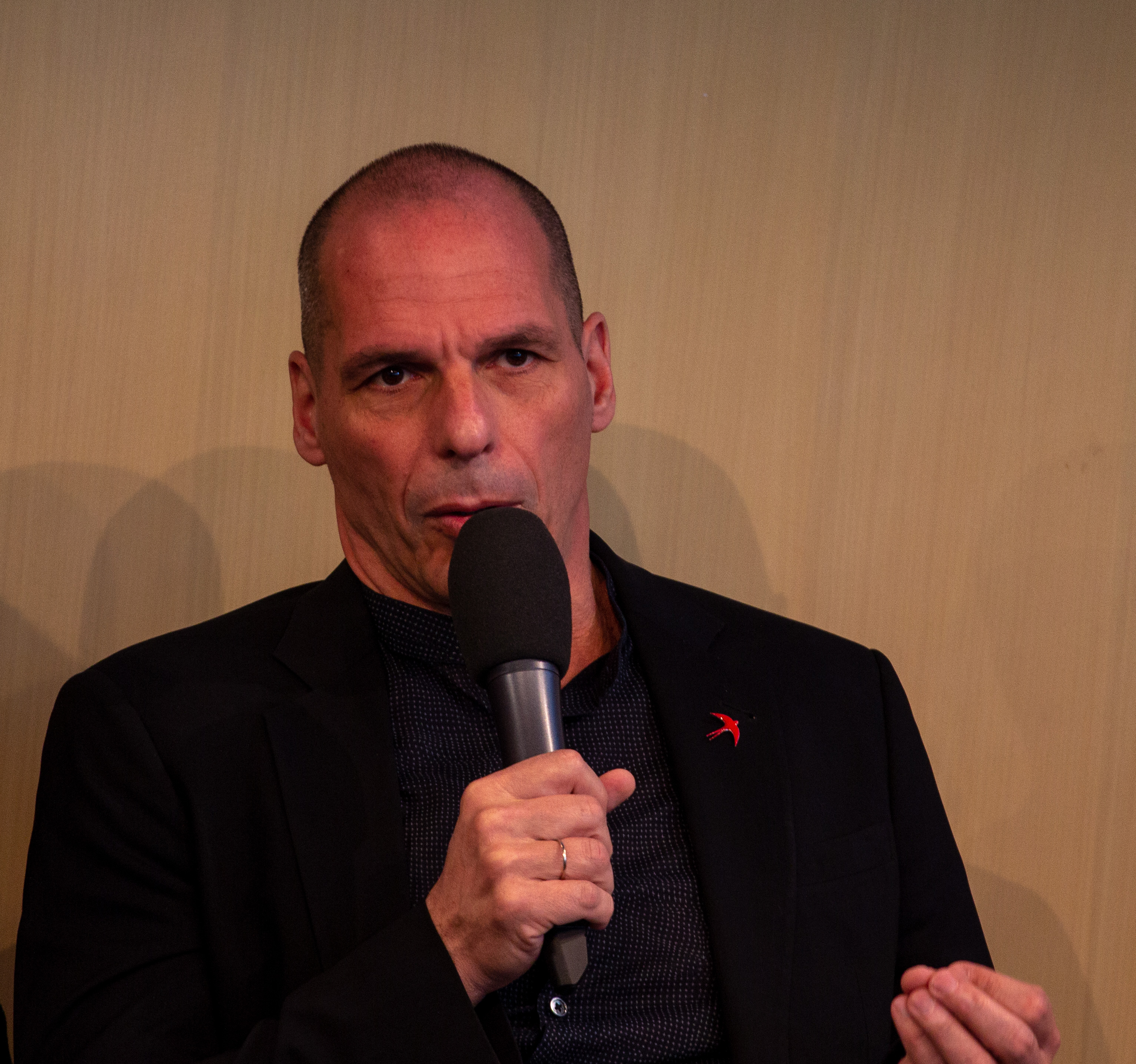 Veranstaltung "A Soul for Europe" am 13. April 2019 in der Akademie der Künste in Berlin. Representatives of European Parties: Carl Grouwet (ALDE), Damian Boeselager (Volt), Hannah Neumann (Bündnis 90/Die Grünen), Violeta Tomic (European Left), Yanis Varoufakis (DIEM25), Elmar Brok (MEP European People’s Party). With: Tanja Dückers, Noémi Kiss, Katja Sinko, Kathrin Röggla and Mia Florentine Weiss. Intervention by Volker Schlöndorff and Hannes Swoboda (former MEP). Moderation: Volker Hassemer